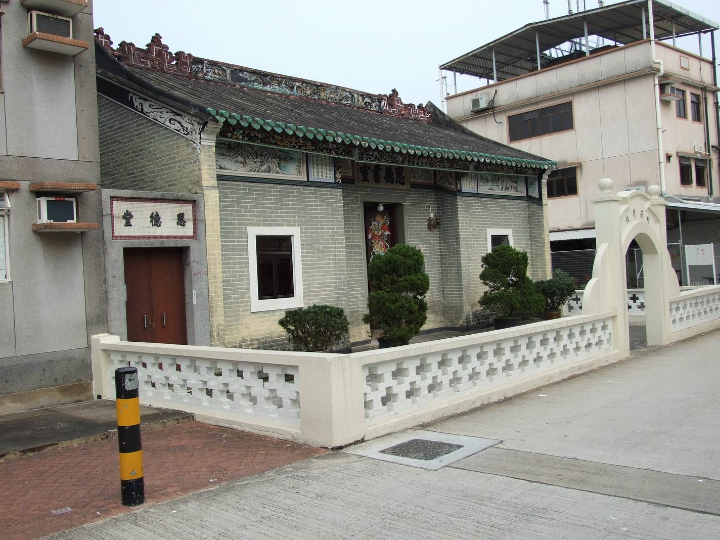 思德書室